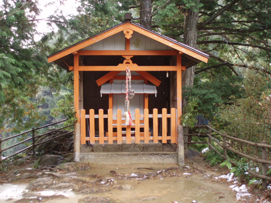 YUNOMINE-oji shrine